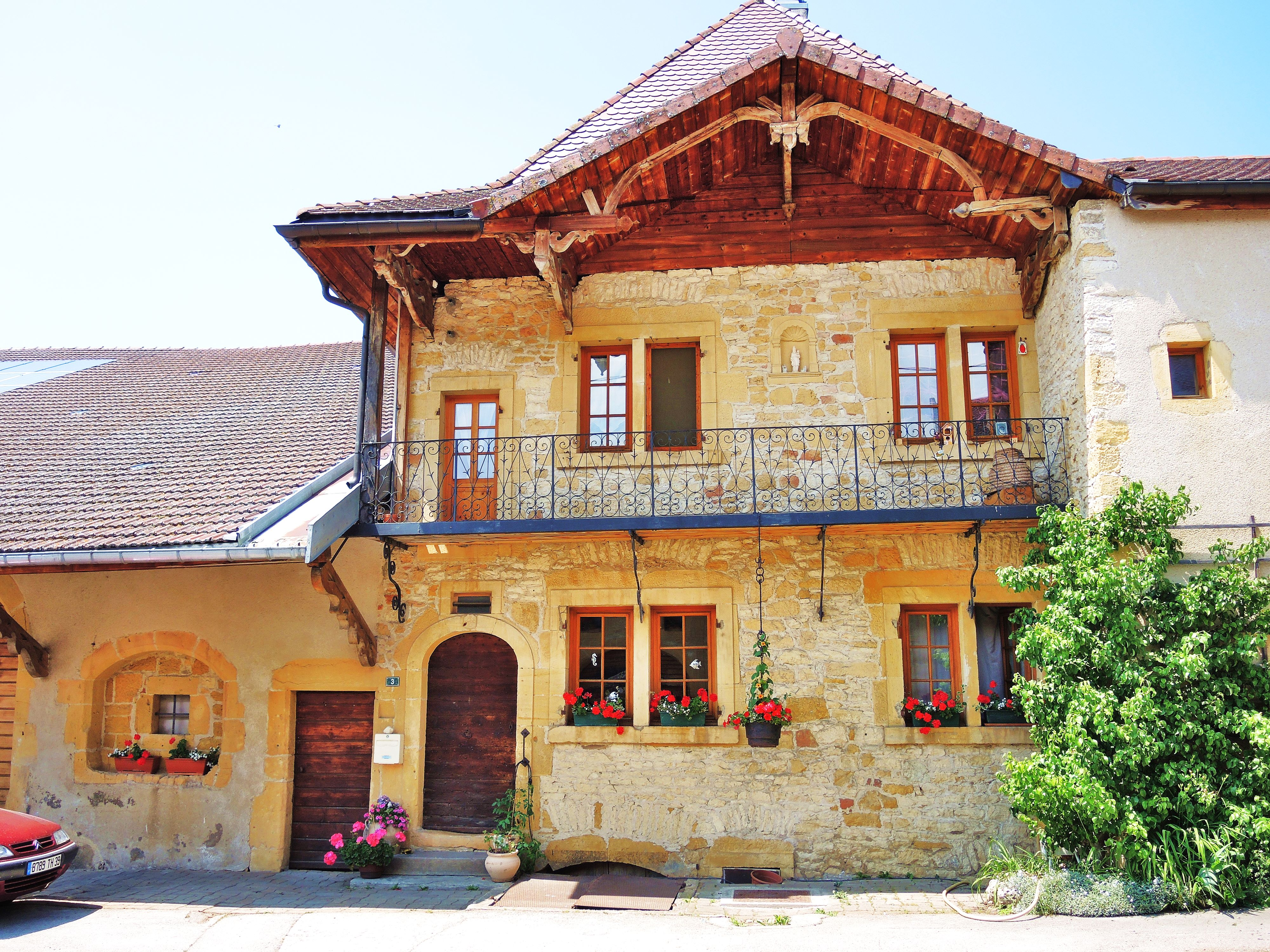 Très jolie maison au centre du village de Mièges.